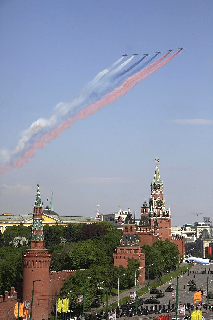 Военный парад, посвящённый 65-летию Победы в Великой Отечественной войне.